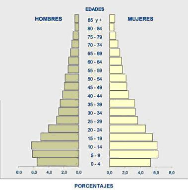 Pirámide de población del Canton Salcedo en la Provincia de Cotopaxi en el centro de Ecuador )2001)